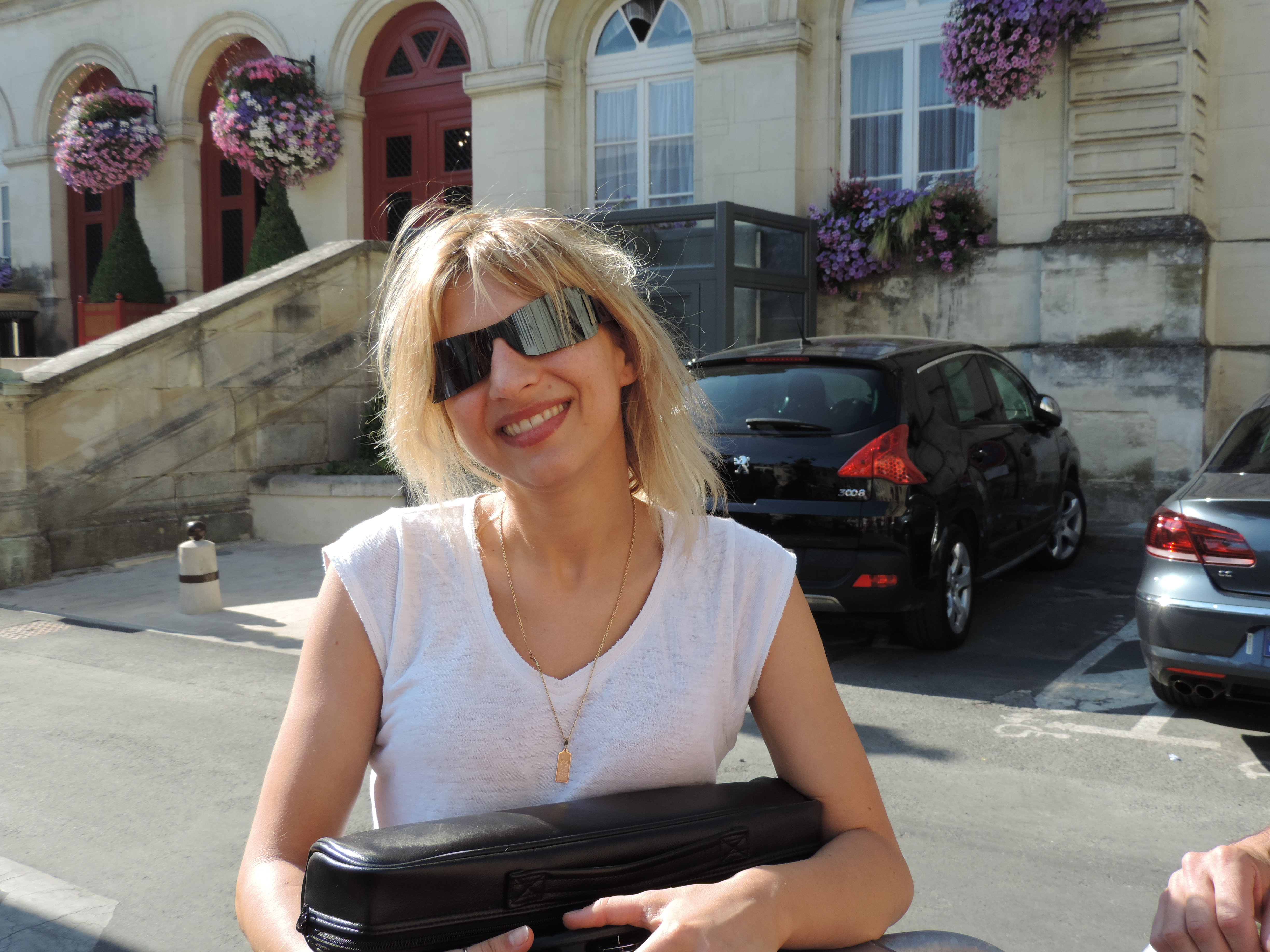 concert laon